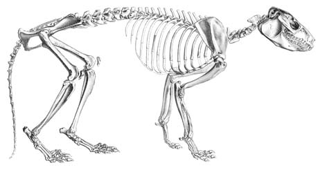 Reconstrucción artística del esqueleto de Protypotherium